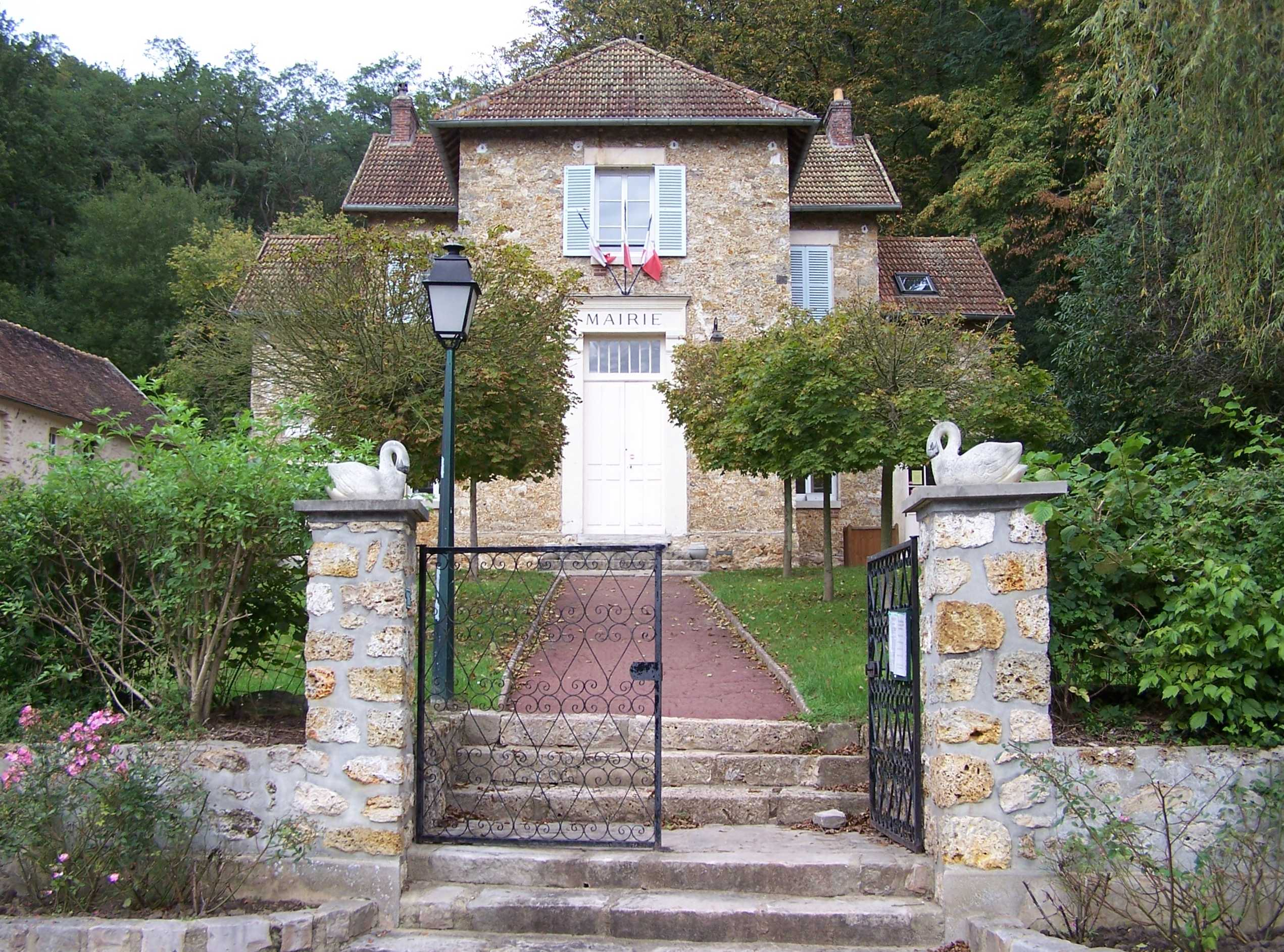 Mairie de Saint-Forget (Yvelines, France)